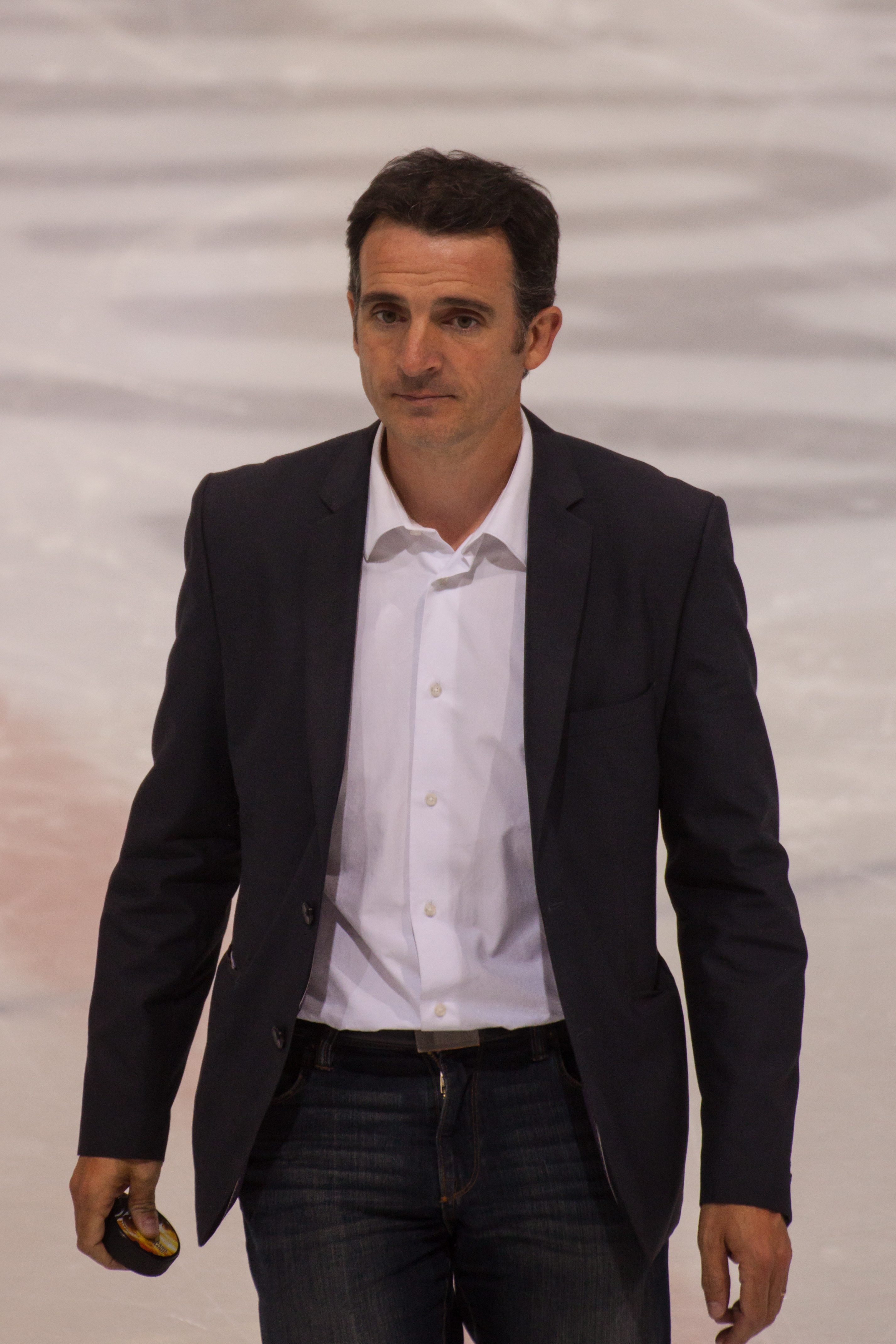 Eric Piolle, Maire de Grenoble, lors du premier match saison des Bruleurs de Loups à la Patinoire Polesud.